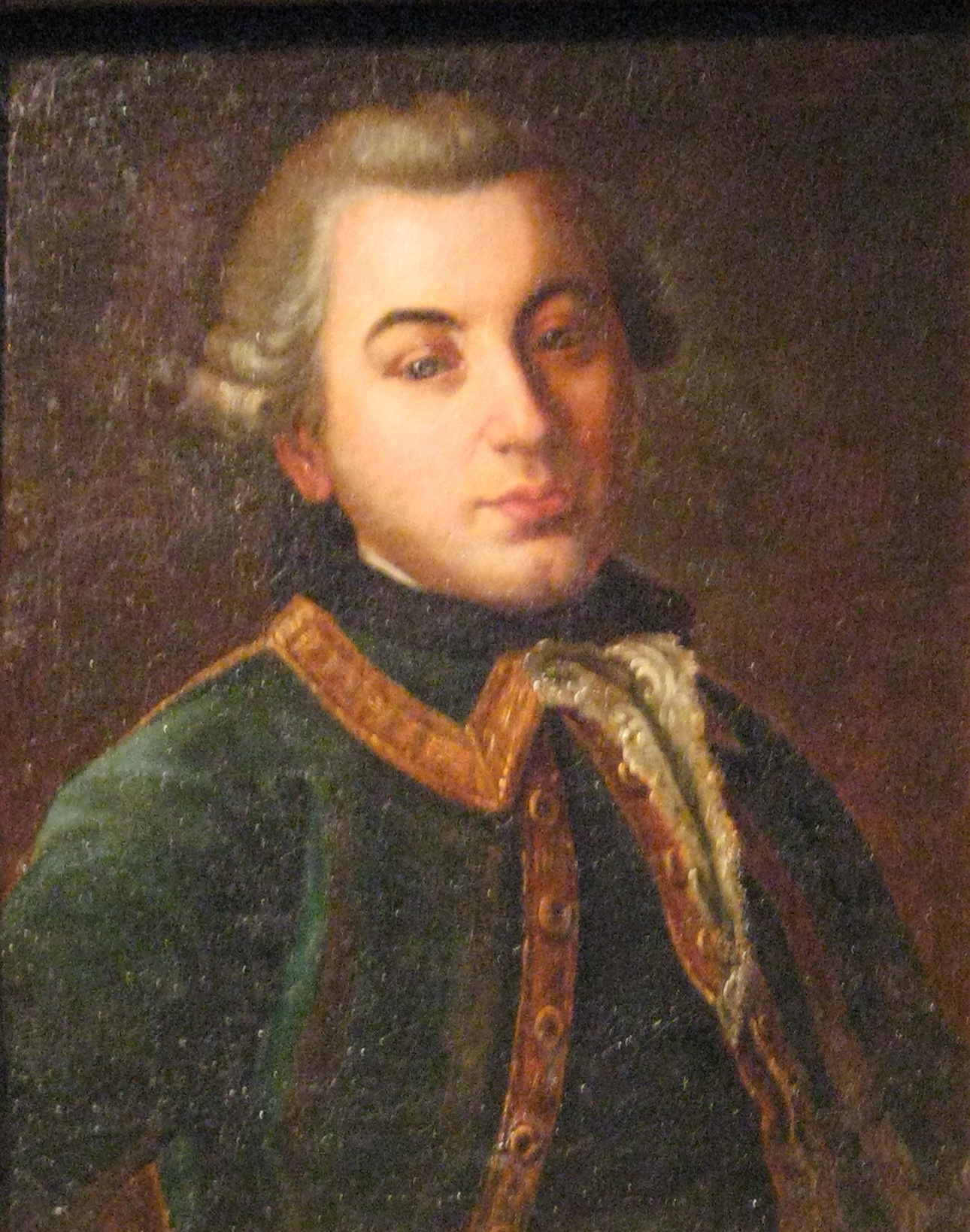 М.И. Дашков. Неизвестный художник, ГИМ. 18 век.